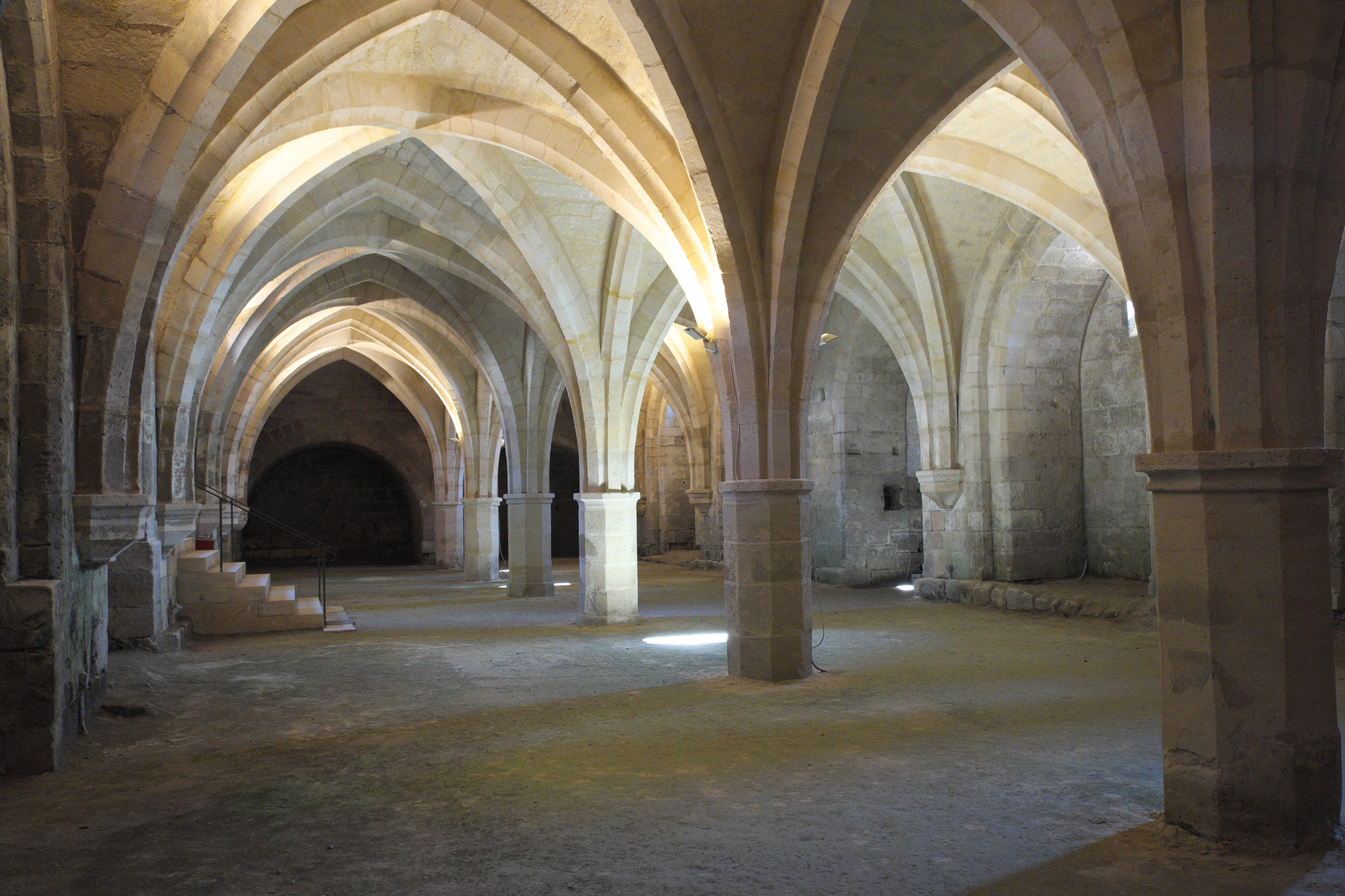 Vorratskeller der ehemaligen Abtei Saint-Jean-des-Vignes in Soissons im Département Aisne (Picardie/Frankreich), unter dem Refektorium